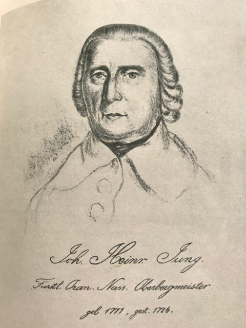 Zeichnung des Fürstlich Oranien-Nassauischen Oberbergmeisters Johann Heinrich Jung, Großvater von Gustav Jung (Eisenhüttenunternehmer).